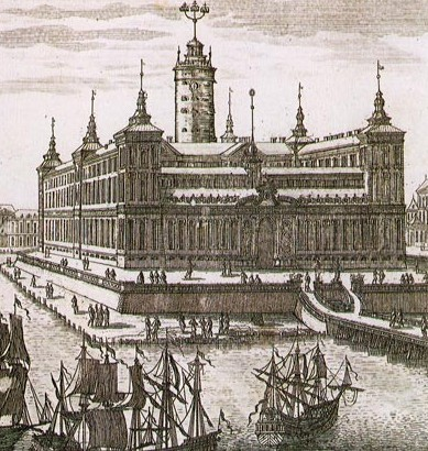 Kungliga slottet, förslag av Jean de la Vallée år 1654. Bild från Description de L'Univers, 1683 av Alain Maesson Mallet.